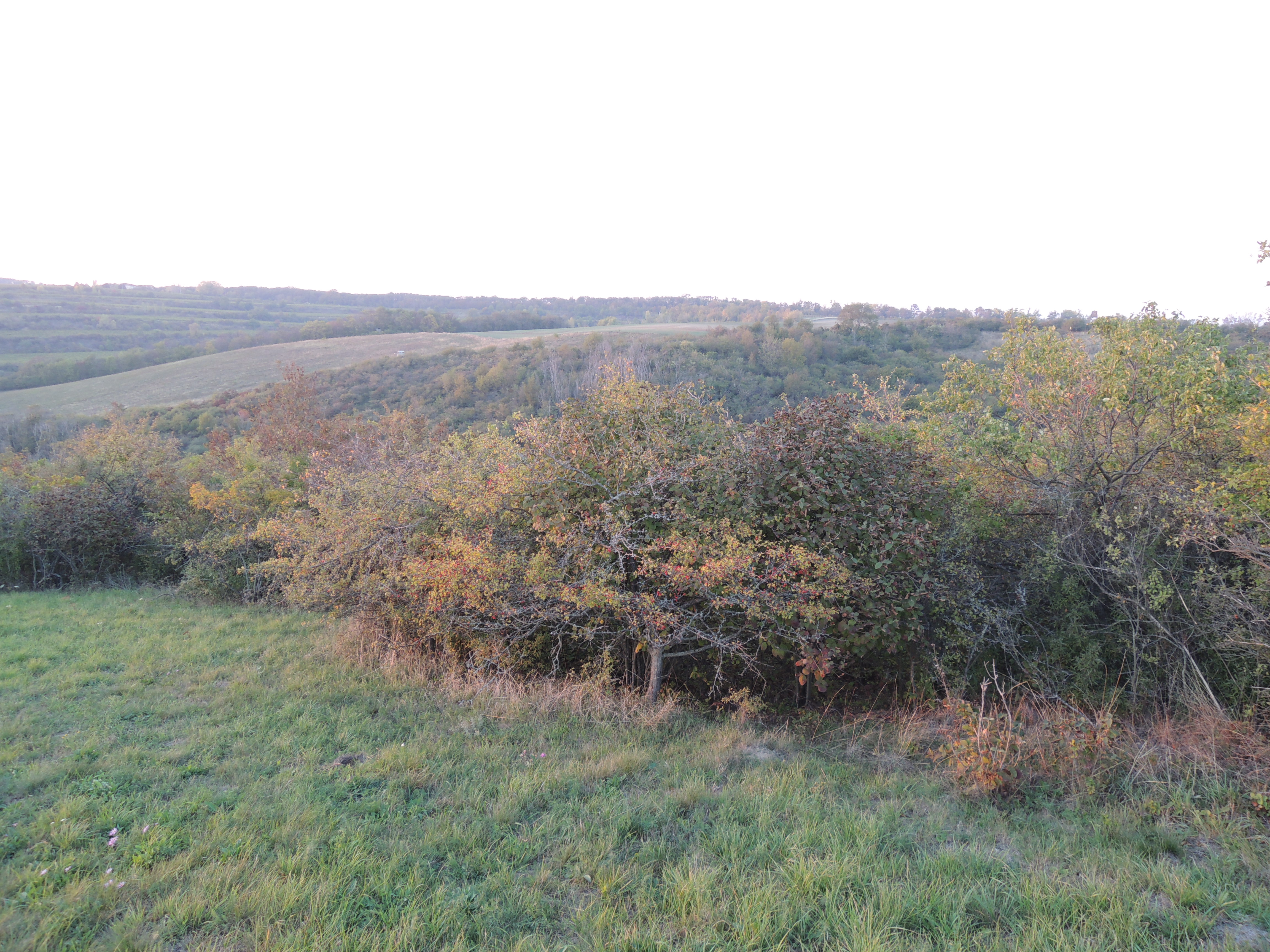 PP Studánkový vrch